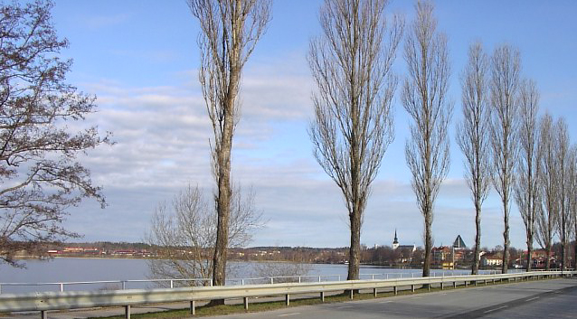 Lindesjön sedd från infarten till Lindesberg